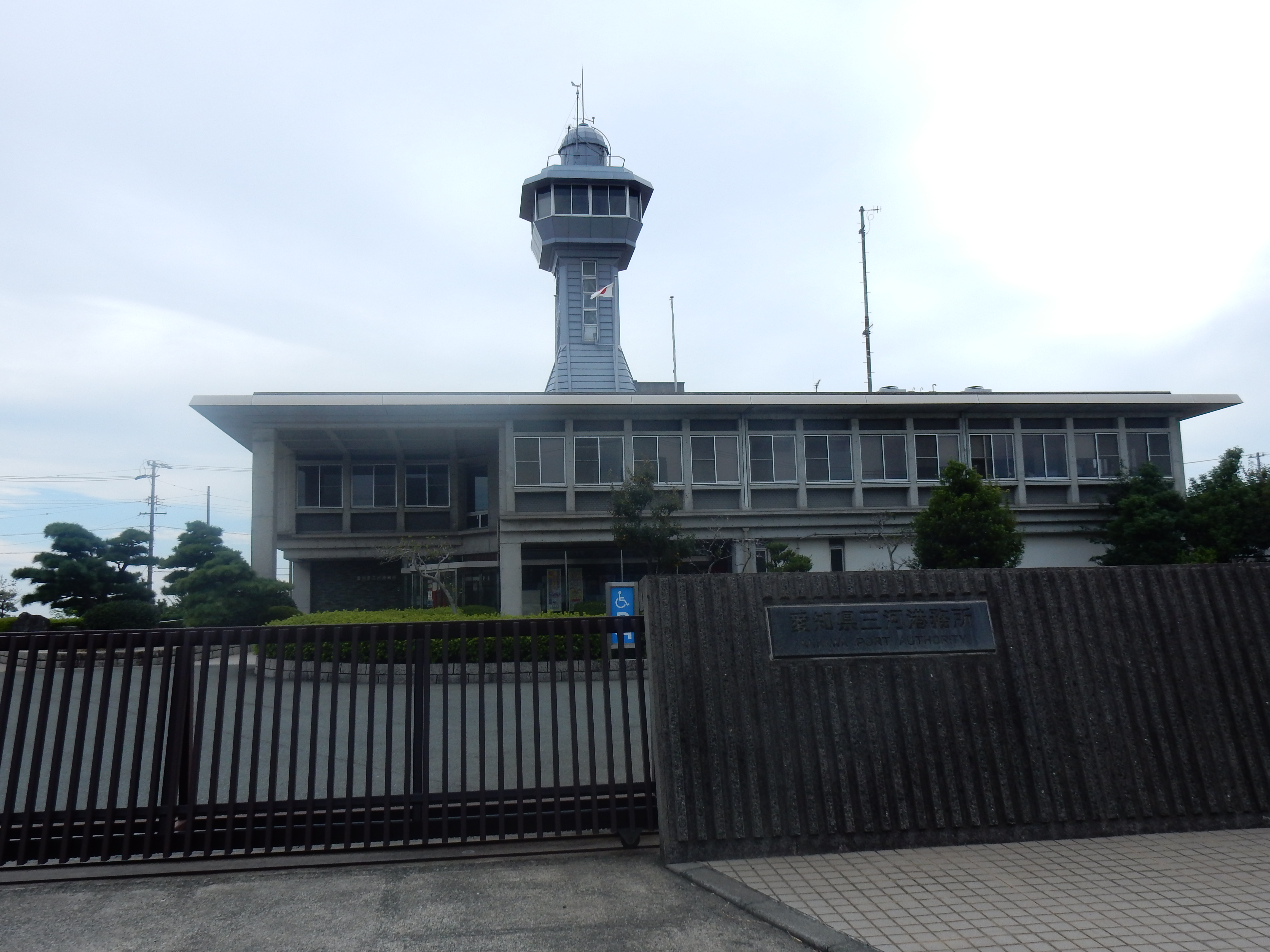 愛知県三河港事務所